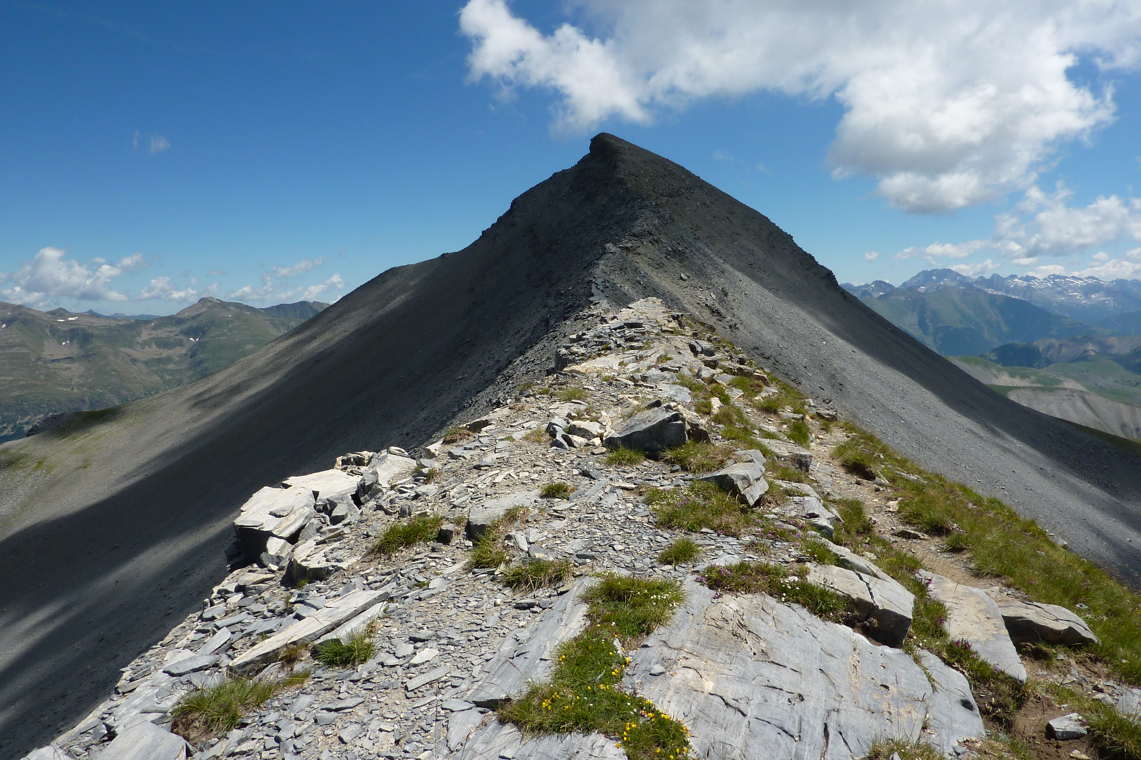 Du Petit-Mounier (2727 m), vue sur le sommet du Mont-Mounier (2817 m) et, au fond, sur sa droite immédiate, sur la "Cima Sud dell'Argentera (3297 m) sommet culminant du massif franco-italien du mercantour-Argentera.